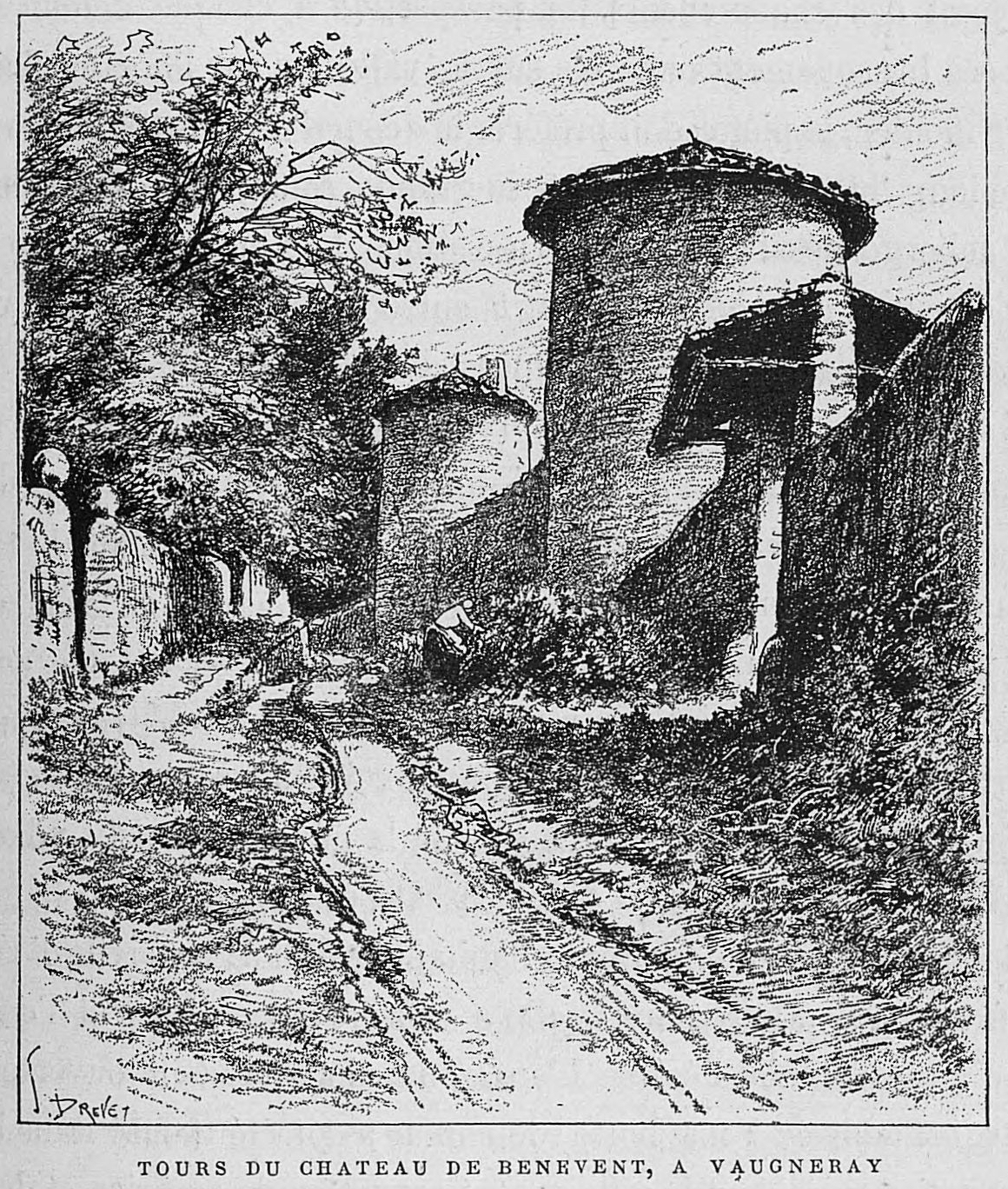 Aux environs de Lyon / Monsieur Josse ; préface de M. Coste-Labaume ; édition illustrée de 250 dessins de J. Drevet.